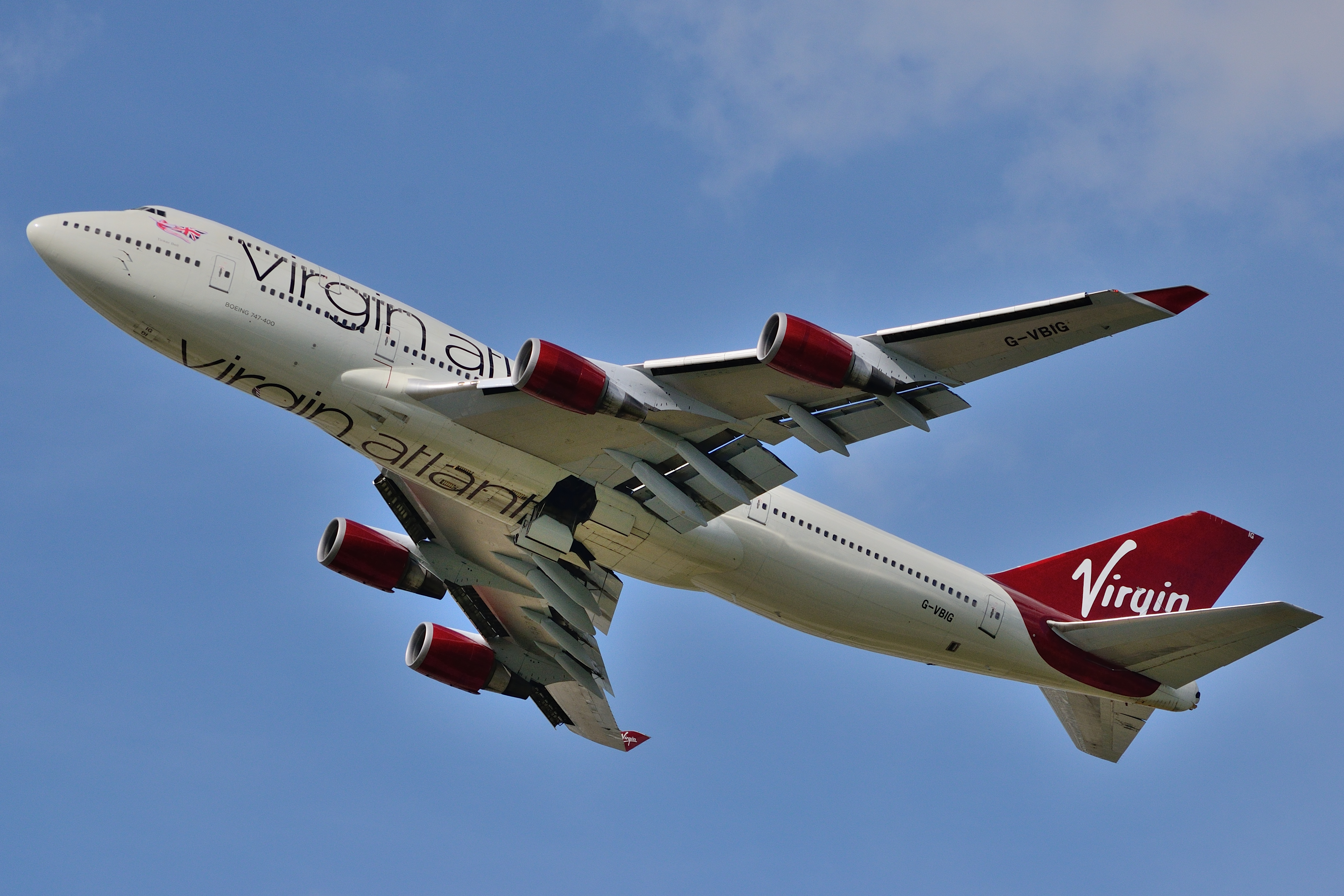 G-VBIG